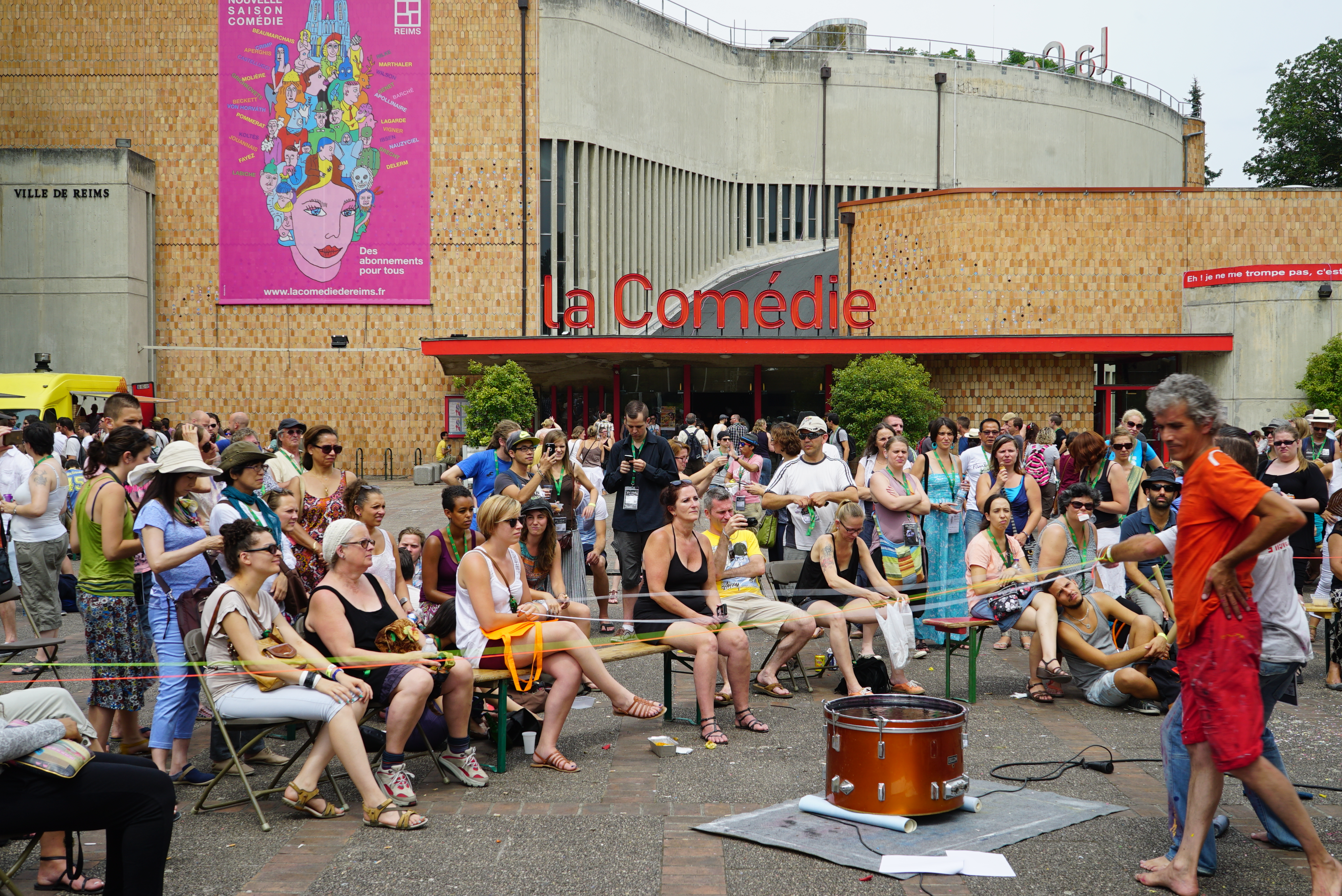 lors du Festival Clin d'oeil de 2015.